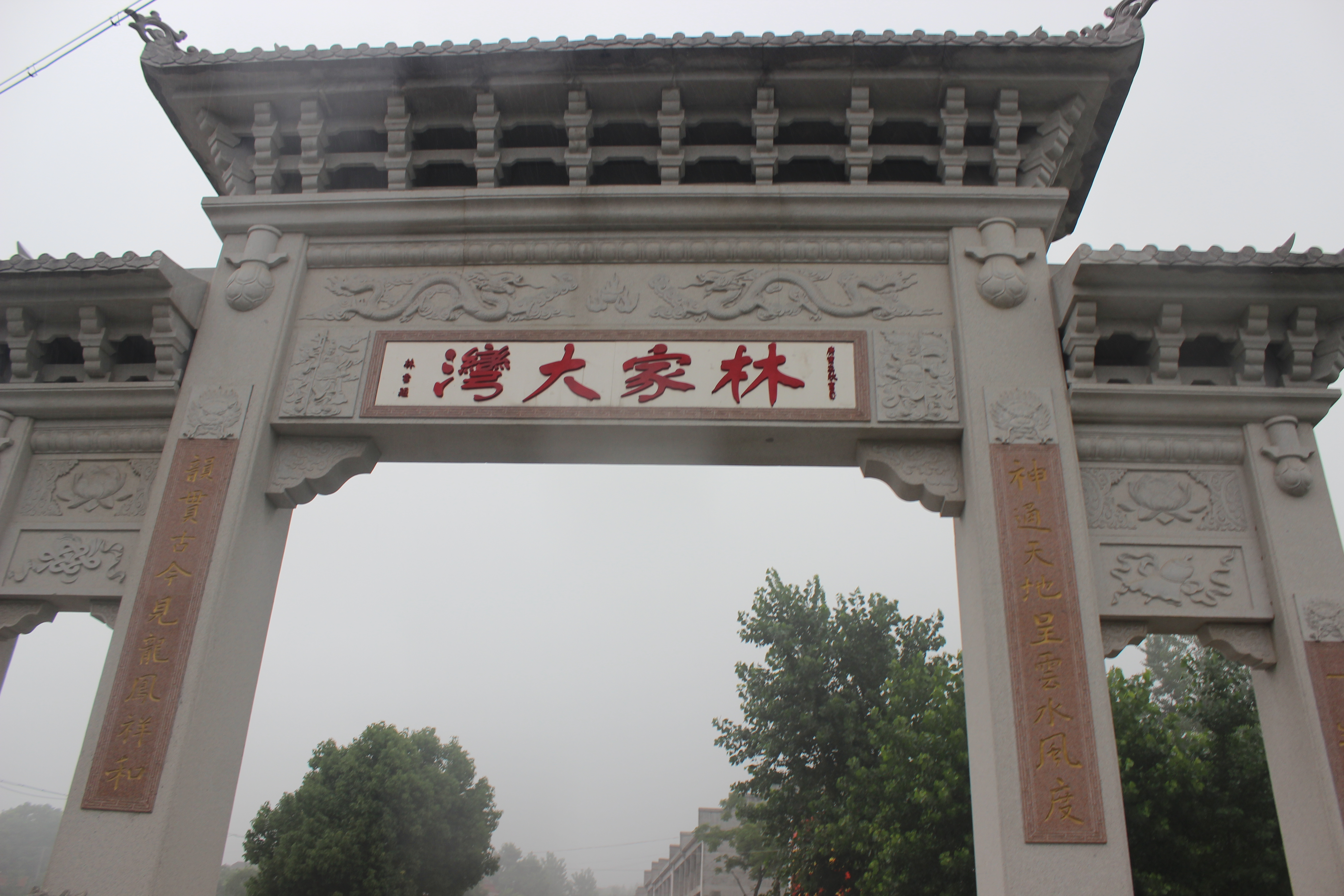 林家大湾 林彪故里